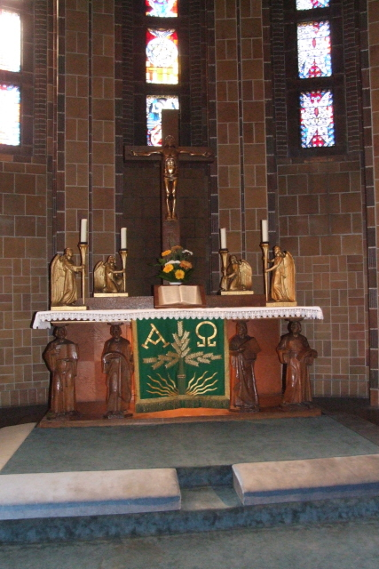 Martin-Luther-Gedächtniskirche Berlin-Mariendorf, Altar Fotograf: Harald Rossa Datum: September 2006 Höher aufgelöste Version ist verfügbar